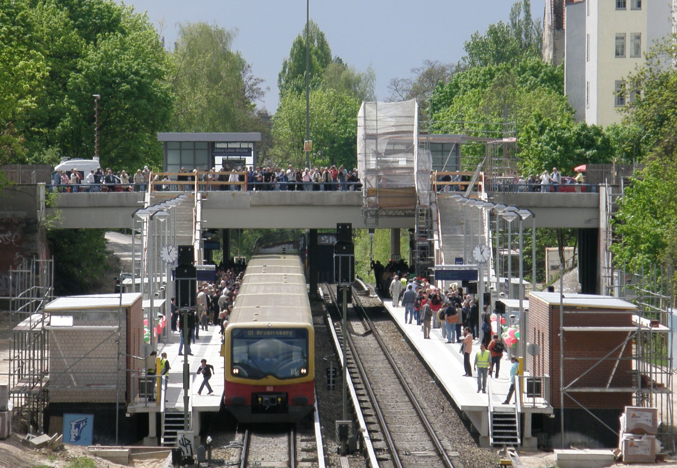 Eröffnung des S-Bahnhofs Julius-Leber-Brücke in Berlin-Schöneberg